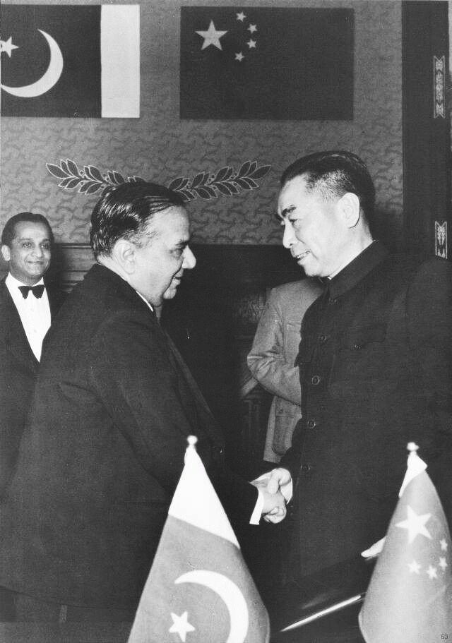 1956年，巴基斯坦总理苏拉瓦底访问中国时，周恩来同苏拉瓦底签订中巴友好条约